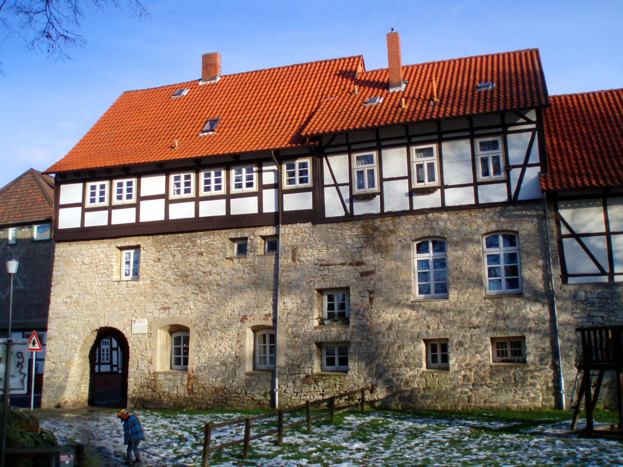 Einbeck, Tiedexer Torhaus